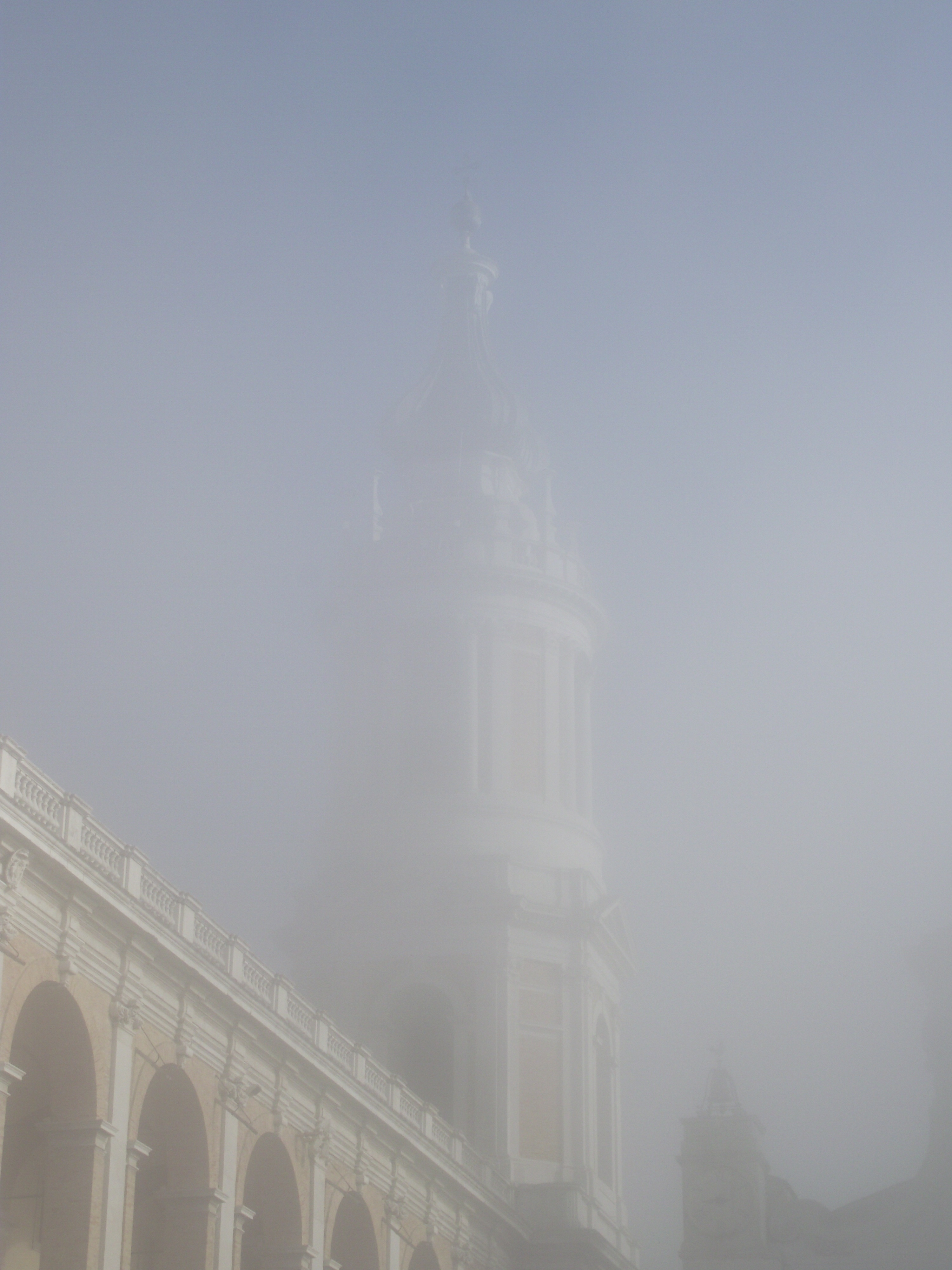 Campanile vanvitelliano al dissolvimento della nebbia